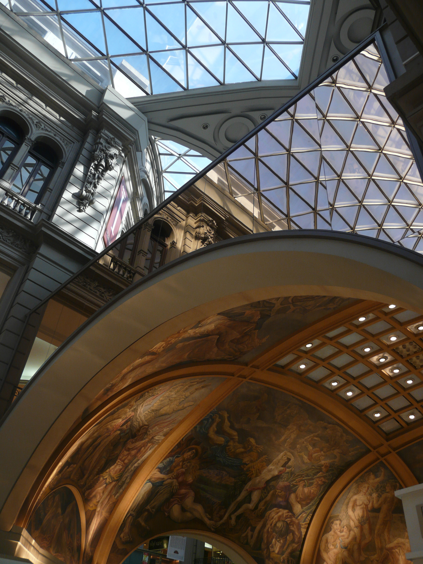 Galerías Pacífico